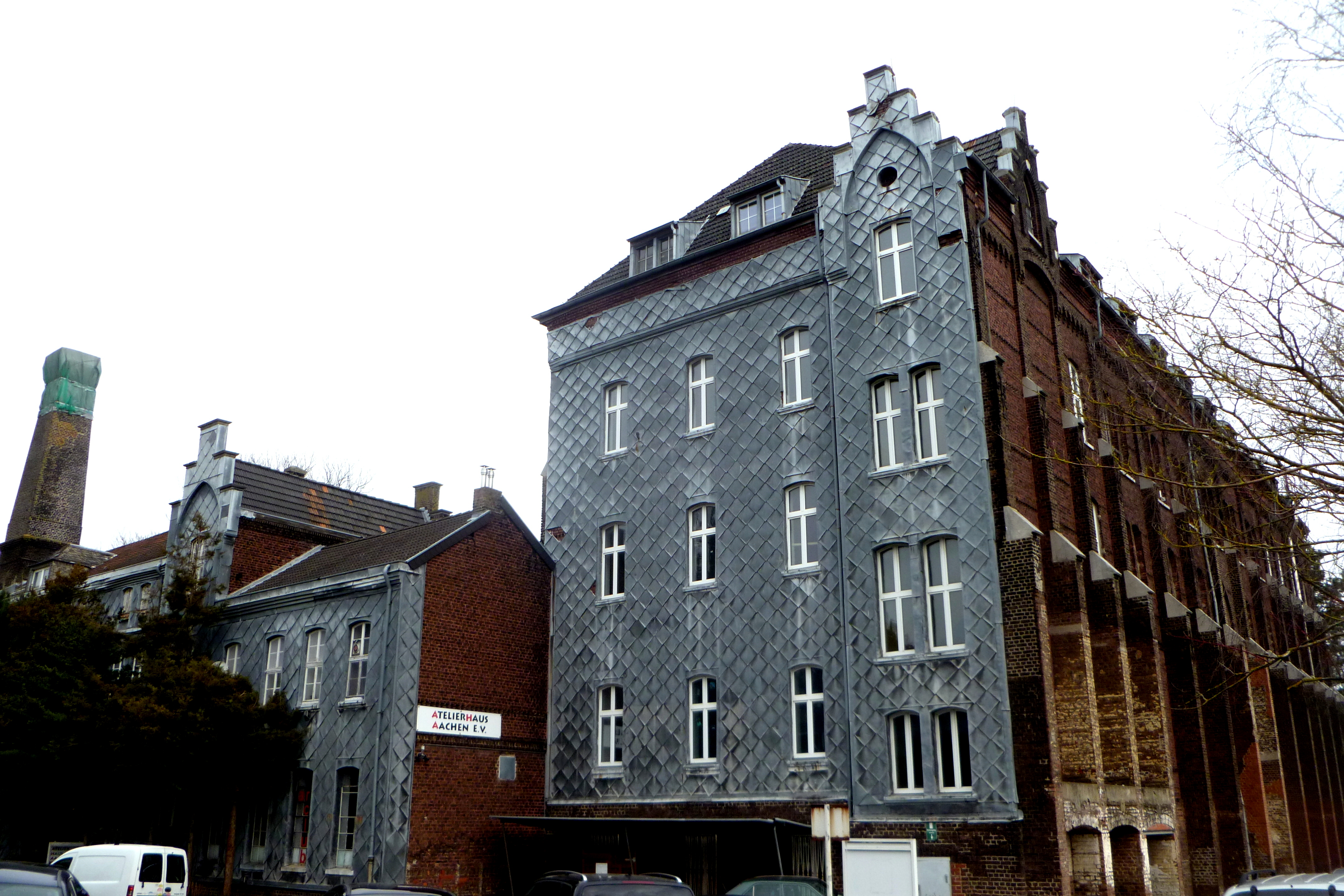 Baudenkmal in Aachen